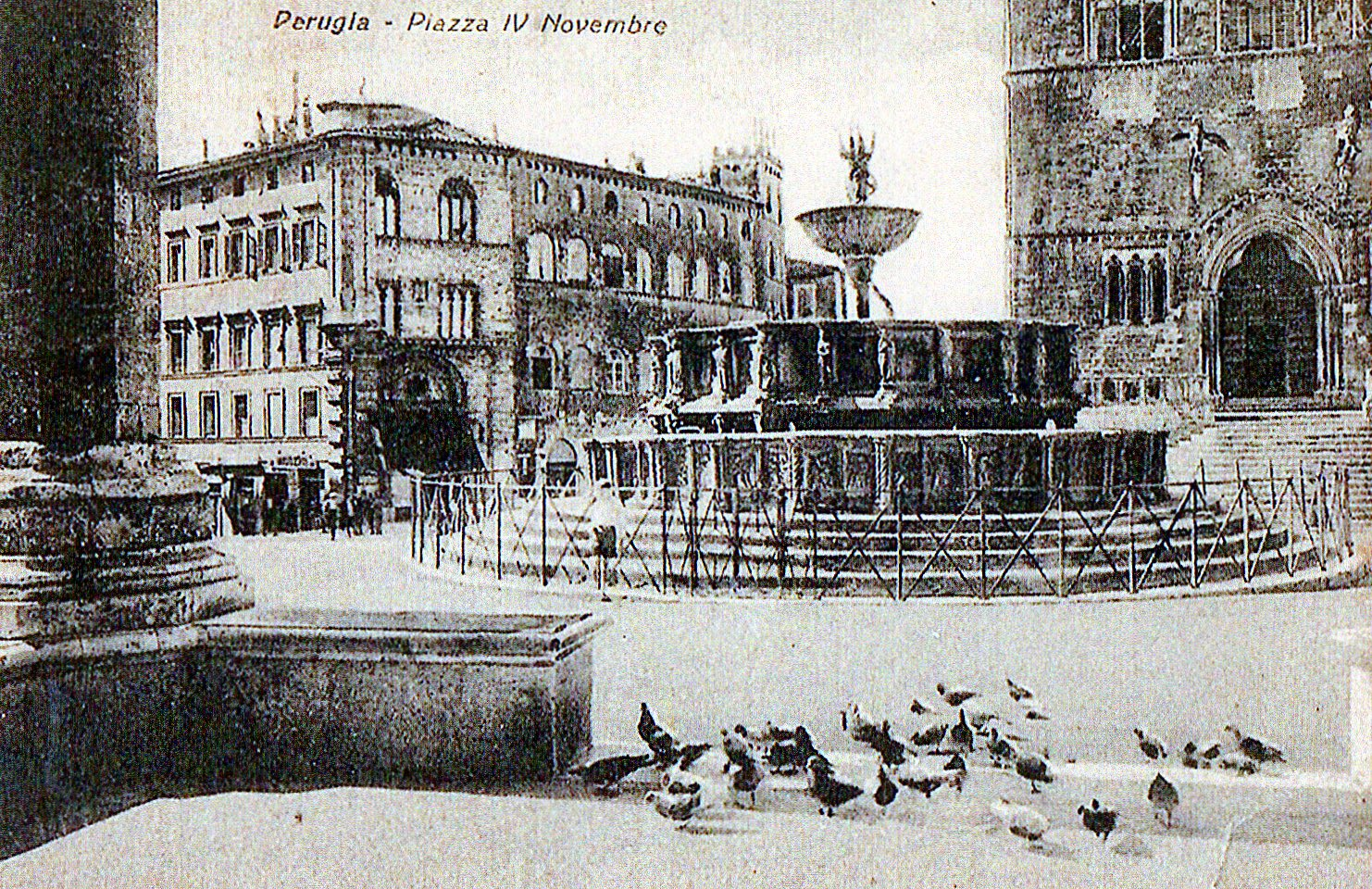 piazza IV Novembre, a Perugia